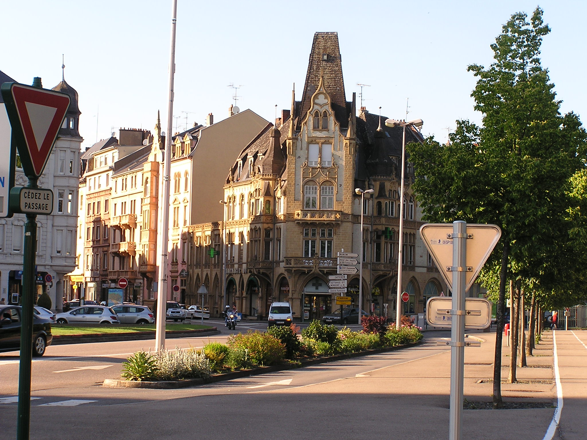 Belle facade